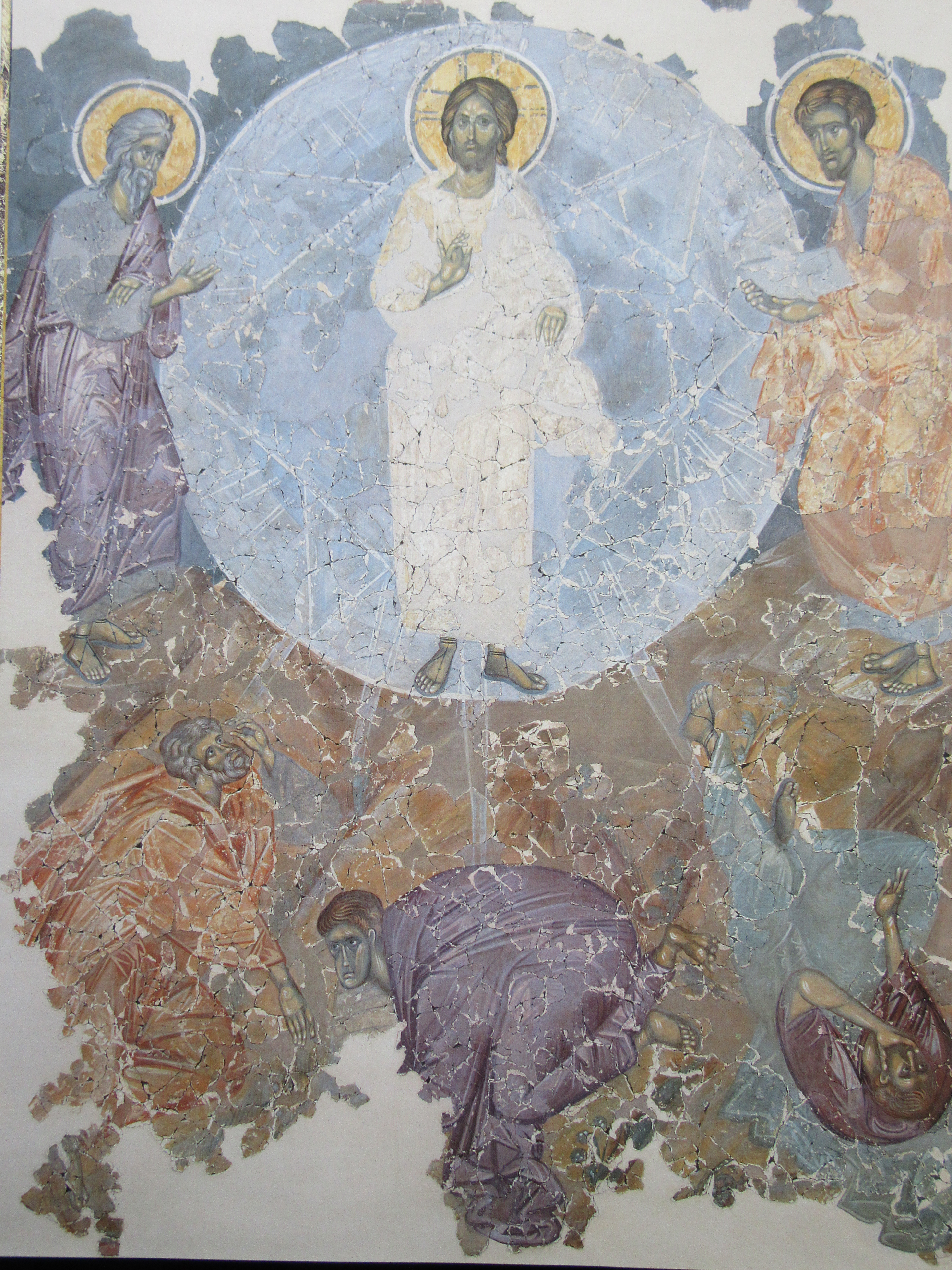 Fresque de l'église de la Transfiguration (le Sauveur-sur-Kovalev)